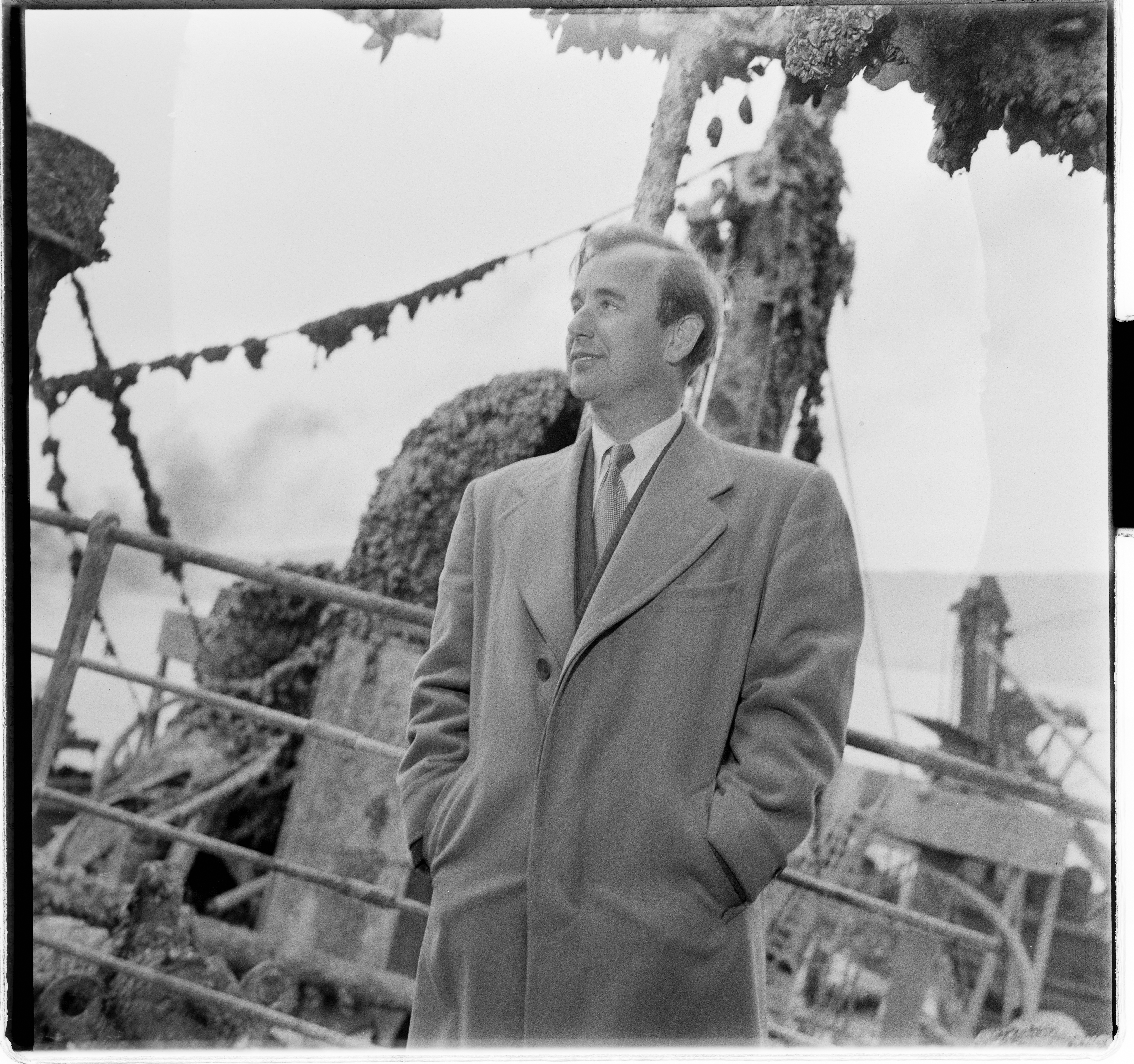 Bildet er hentet fra Arkivverket. Max Manus. Foto tatt i forbindelse med at vraket etter Donau ble hevet. NÅ nr. 8 Arkivinstitusjon : Riksarkivet Arkivnavn : Billedbladet NÅ Sted : Norge, Akershus, Ukjent, Emneord: Drøbak, DS Donau, Portrett, SS Donau, Vrak, Ødeleggelser, Max Manus, Skipsvrak, Mann Avbildet